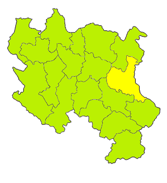 Map of Zaječar